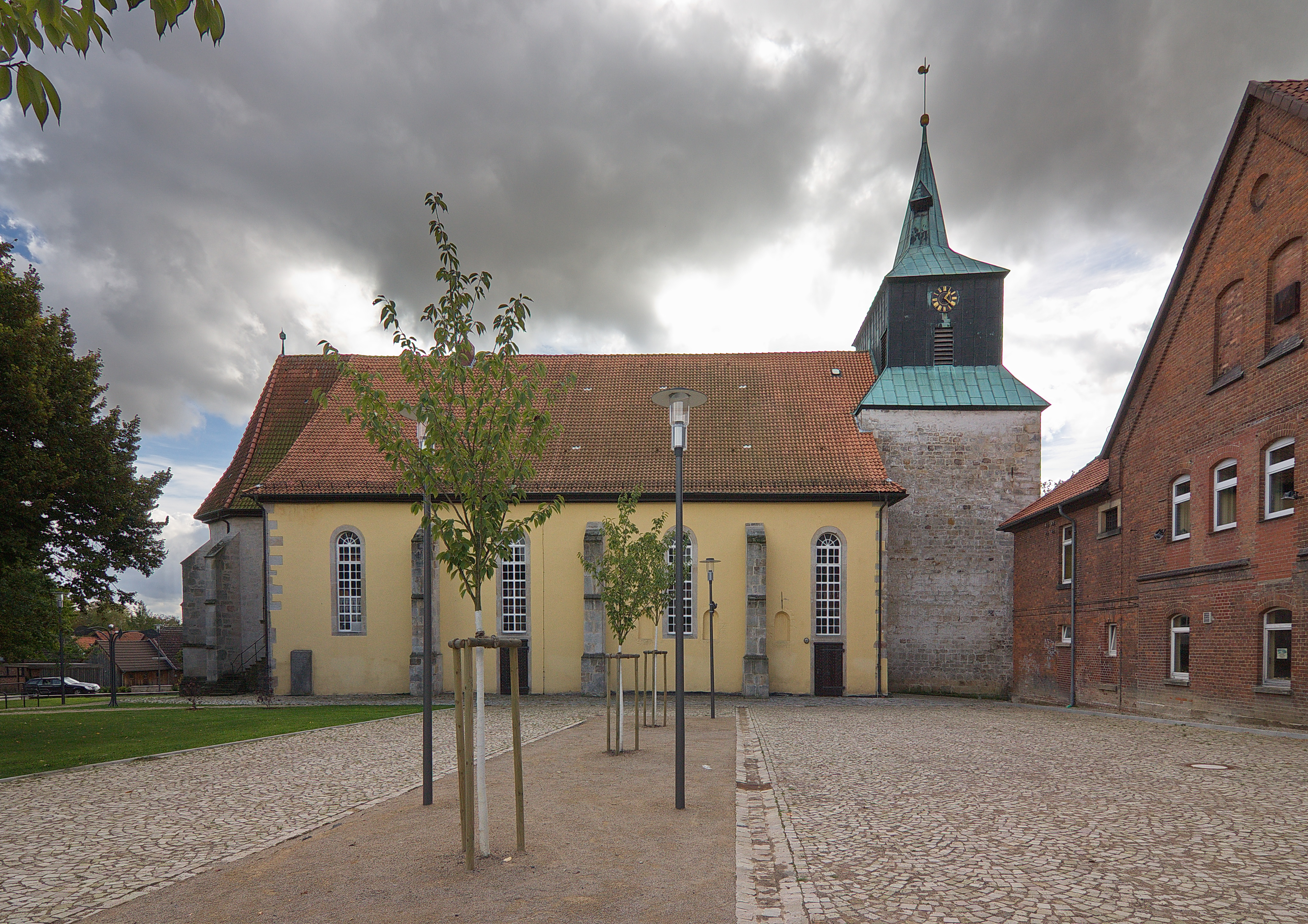 Kirche St.Alexandri am Marktplatz 2 in Eldagsen (Springe), Niedersachsen, Deutschland